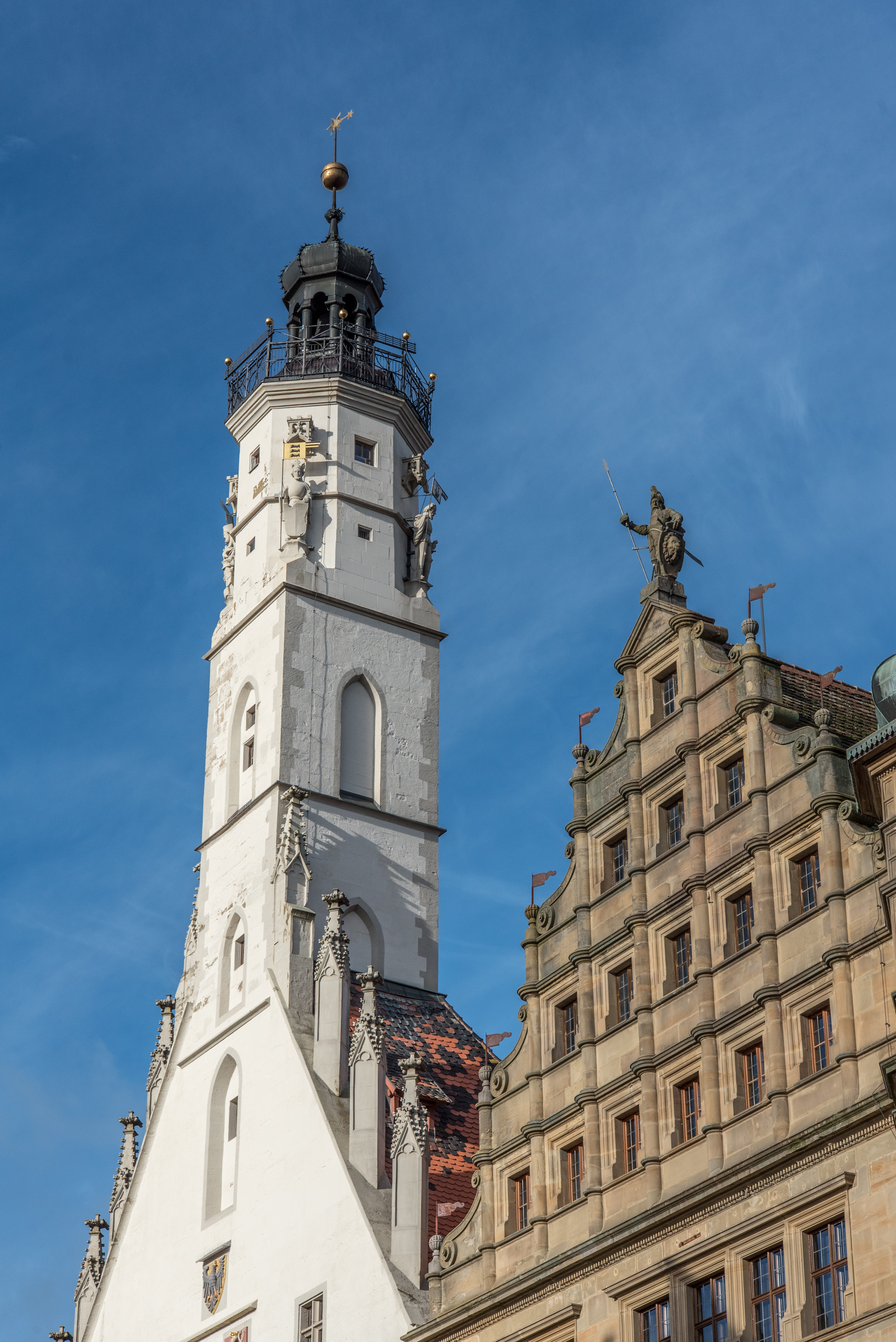 Rothenburg ob der Tauber, Marktplatz 1, Ansicht von Südwesten